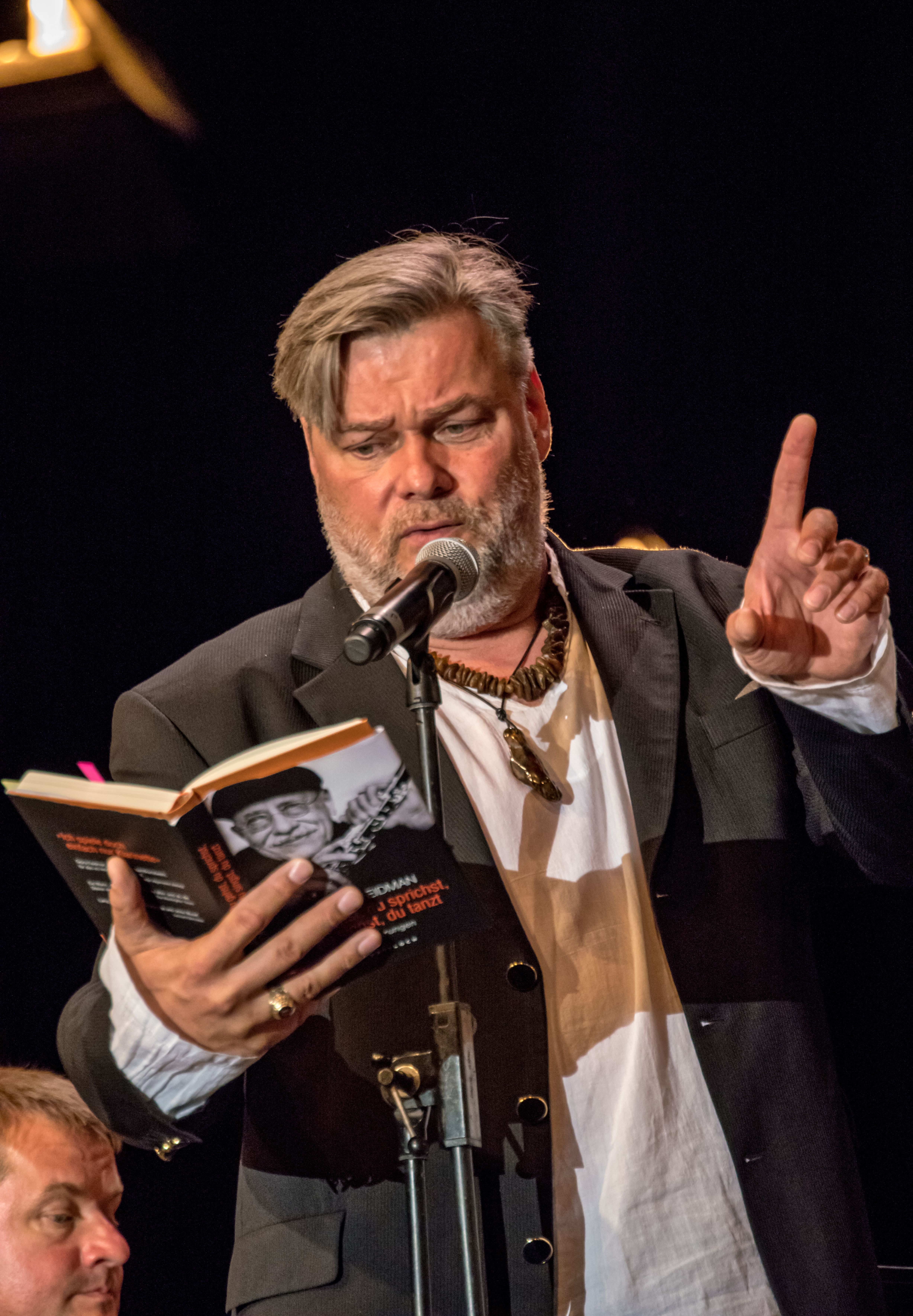 Bilder vom Zelt Musik Festival 2016 in Freiburg im Breisgau Die Gala